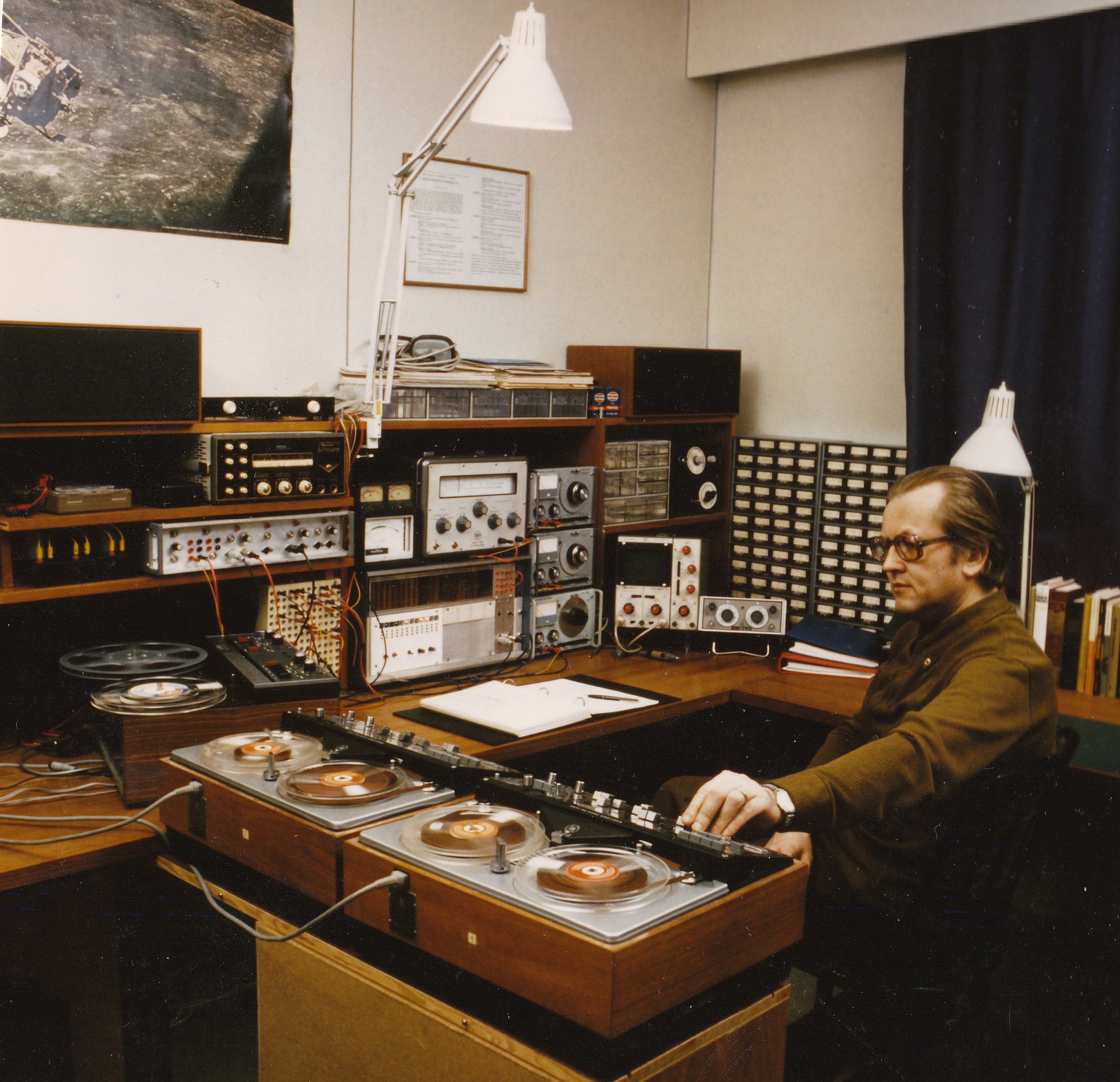 Osmo Lindeman elektronisen musiikin kotistudiossaan v. 1972